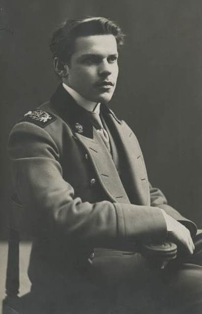 Р. Р. Иодко, Москва, 1916 год, 22 года